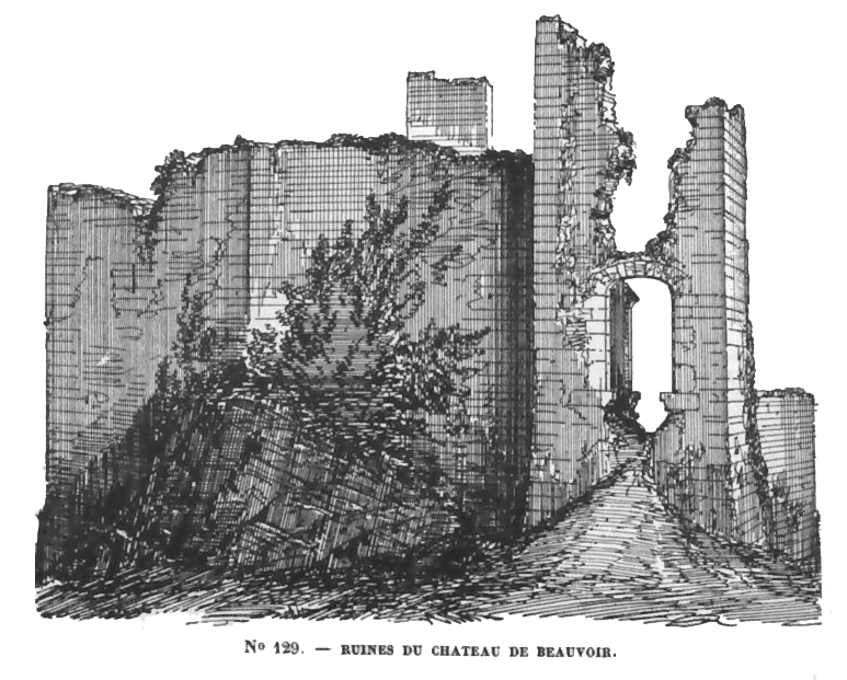 Sauvigny-le-Beuréal, Yonne : dessin du château de Beauvoir